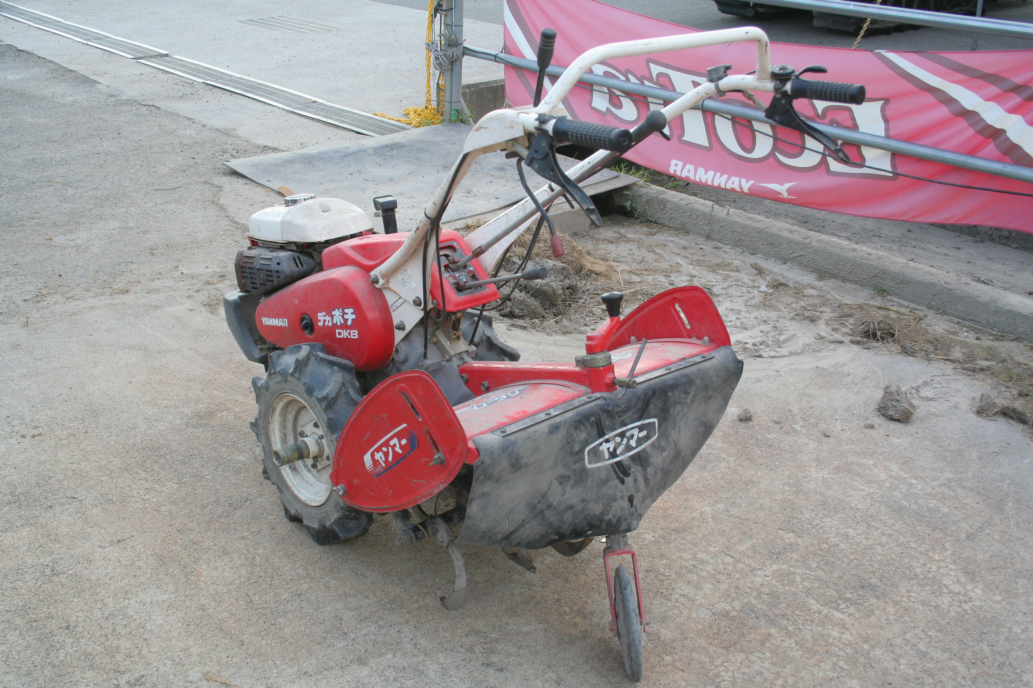 日本の農作業用機械。耕耘機。